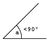 Acute angle